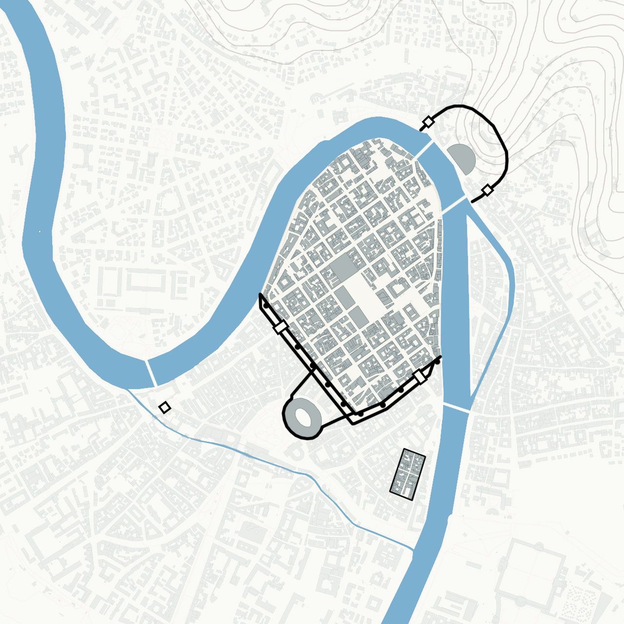 Planimetria della città di Verona con le mura e le porte urbiche principali. Vedi anche Le mura di Verona di Annamaria Conforti Calcagni.